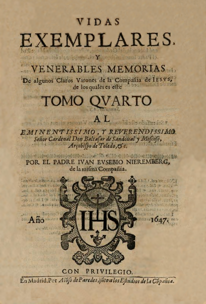 Portada del libro "Vidas ejemplares y venerables memorias de algunos claros varones de la Compañía de Jesús" (tomo IV). Publicado en español por Juan Eusebio Nieremberg en Madrid, en 1647.